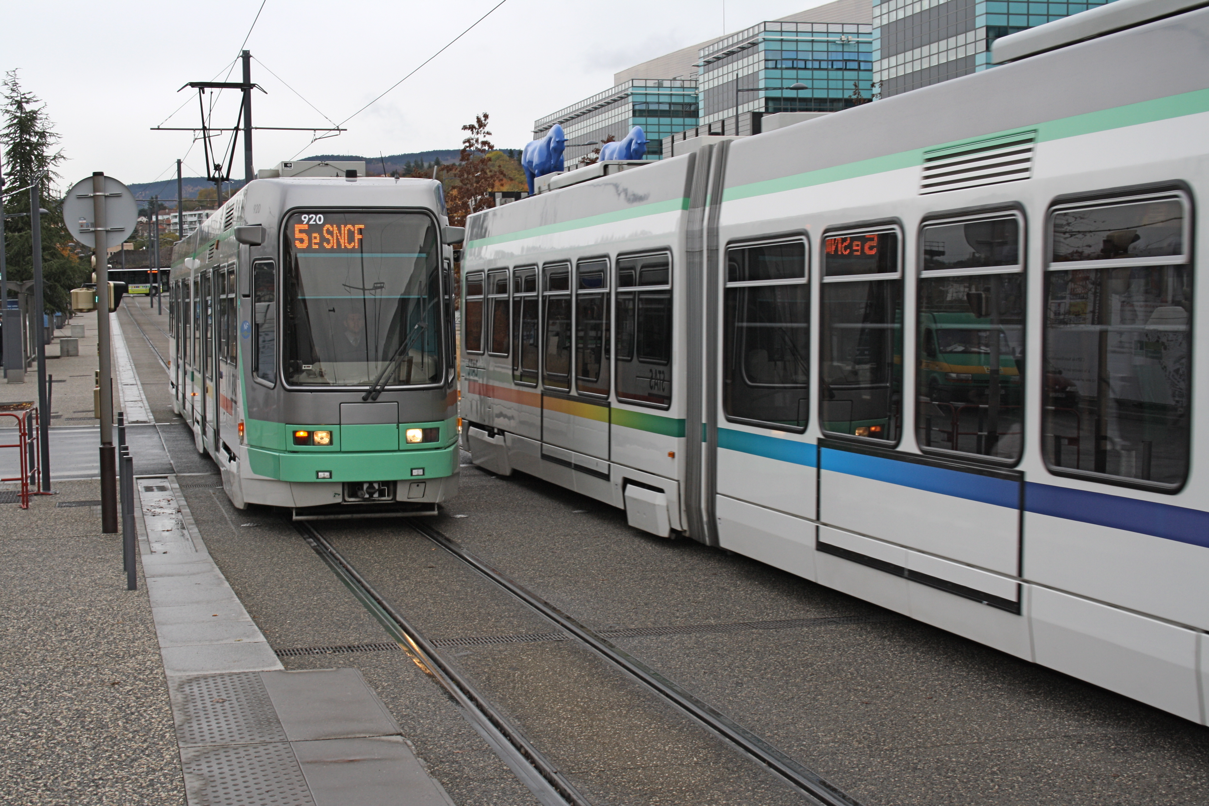 Tramway français standard in Saint-Étienne